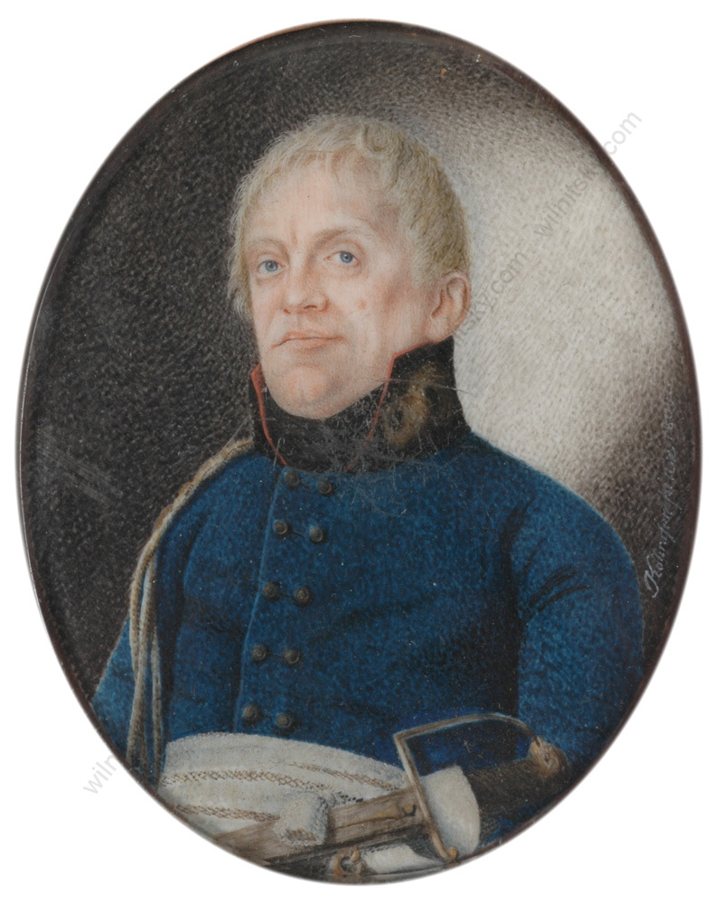 Miniaturpotrait des in Bremen geborenen, späteren Generals in russischen Diensten, Wilhelm von Arentschildt (1761-1835)